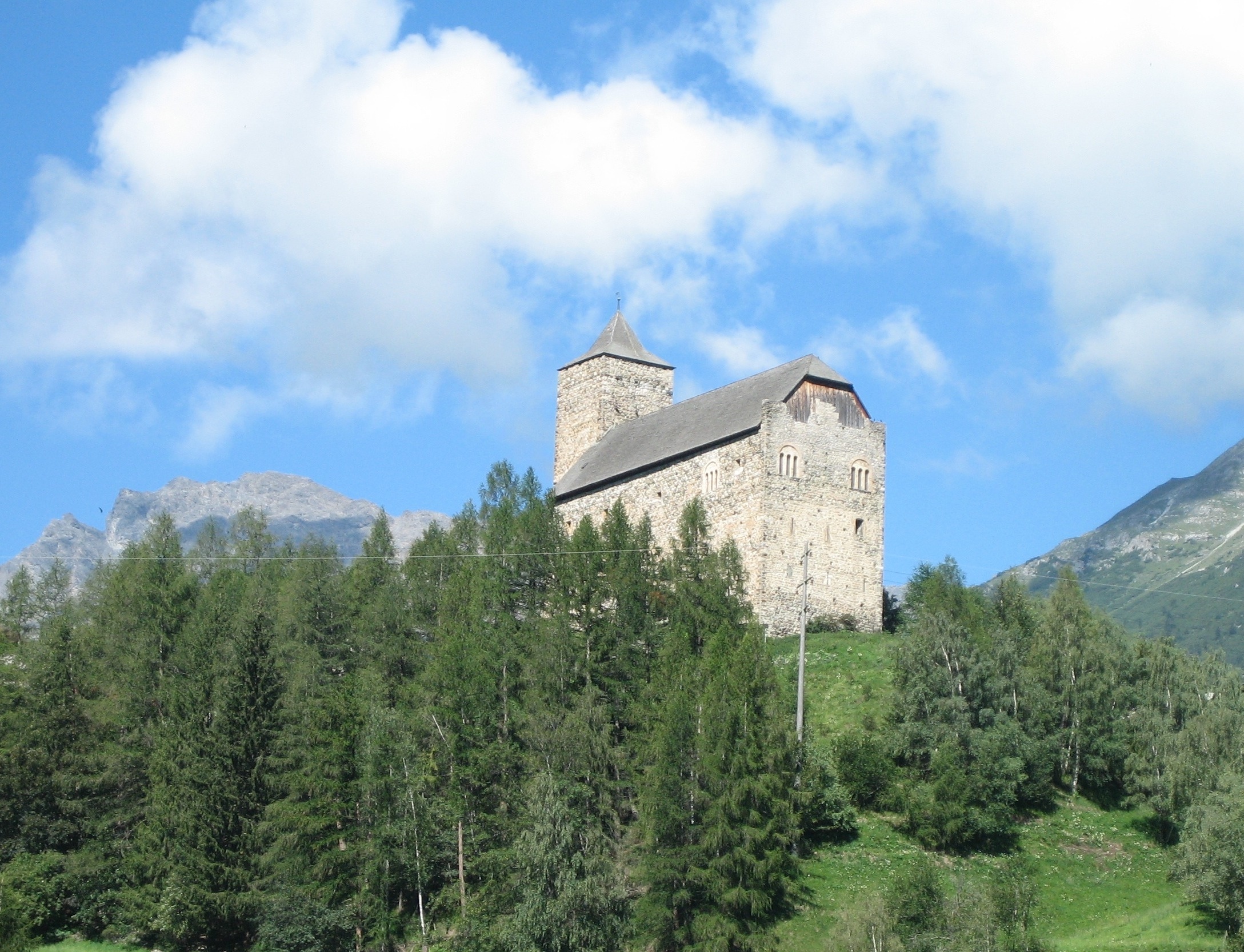 Burg Riom: Ansicht von Südosten Rumantsch: Casti da Riom, vista digl sidost